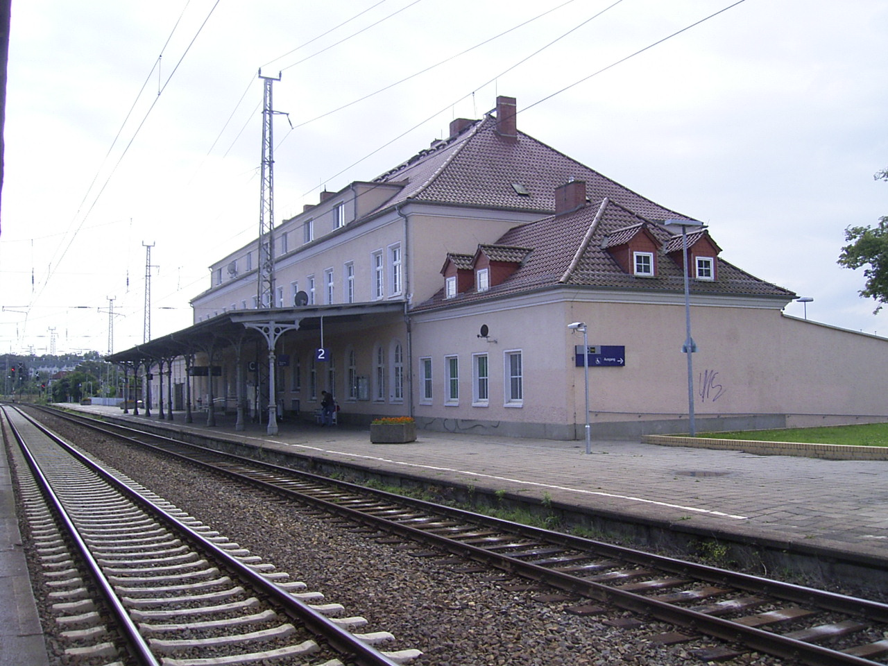 Der Bahnhof von Prenzlau in Brandenburg.